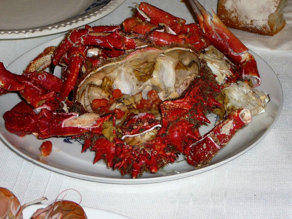 Plato de centolla, de la ría de Pontevedra-Marín.